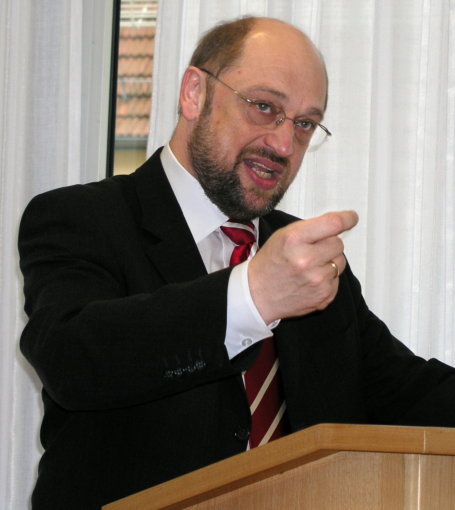 Martin Schulz, Europapolitiker SPE